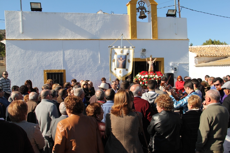 Fiestas en honor al Niño de Nápoles